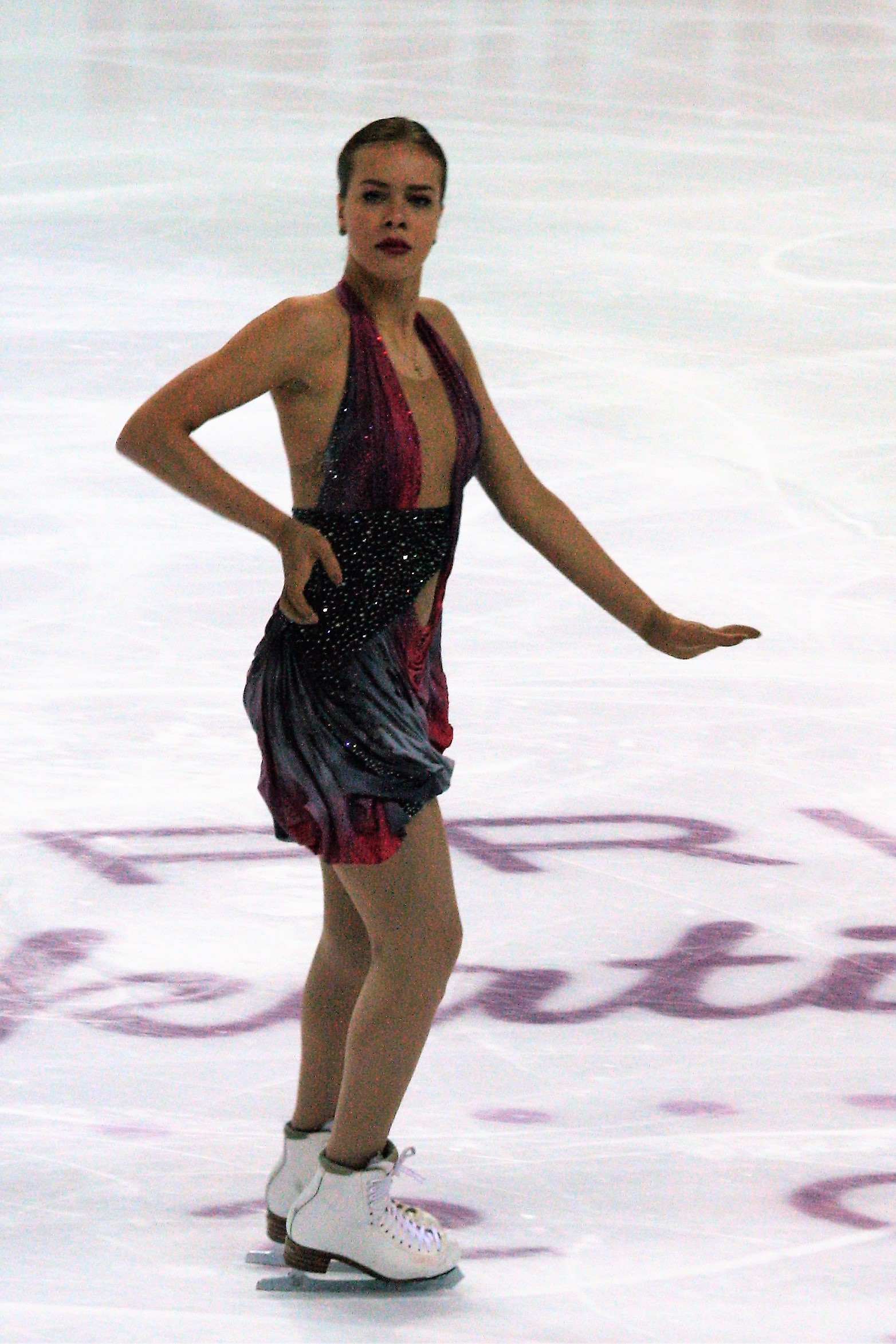 Анна Погорилая (Россия) на финале Гран-при по фигурному катанию 2016-2017